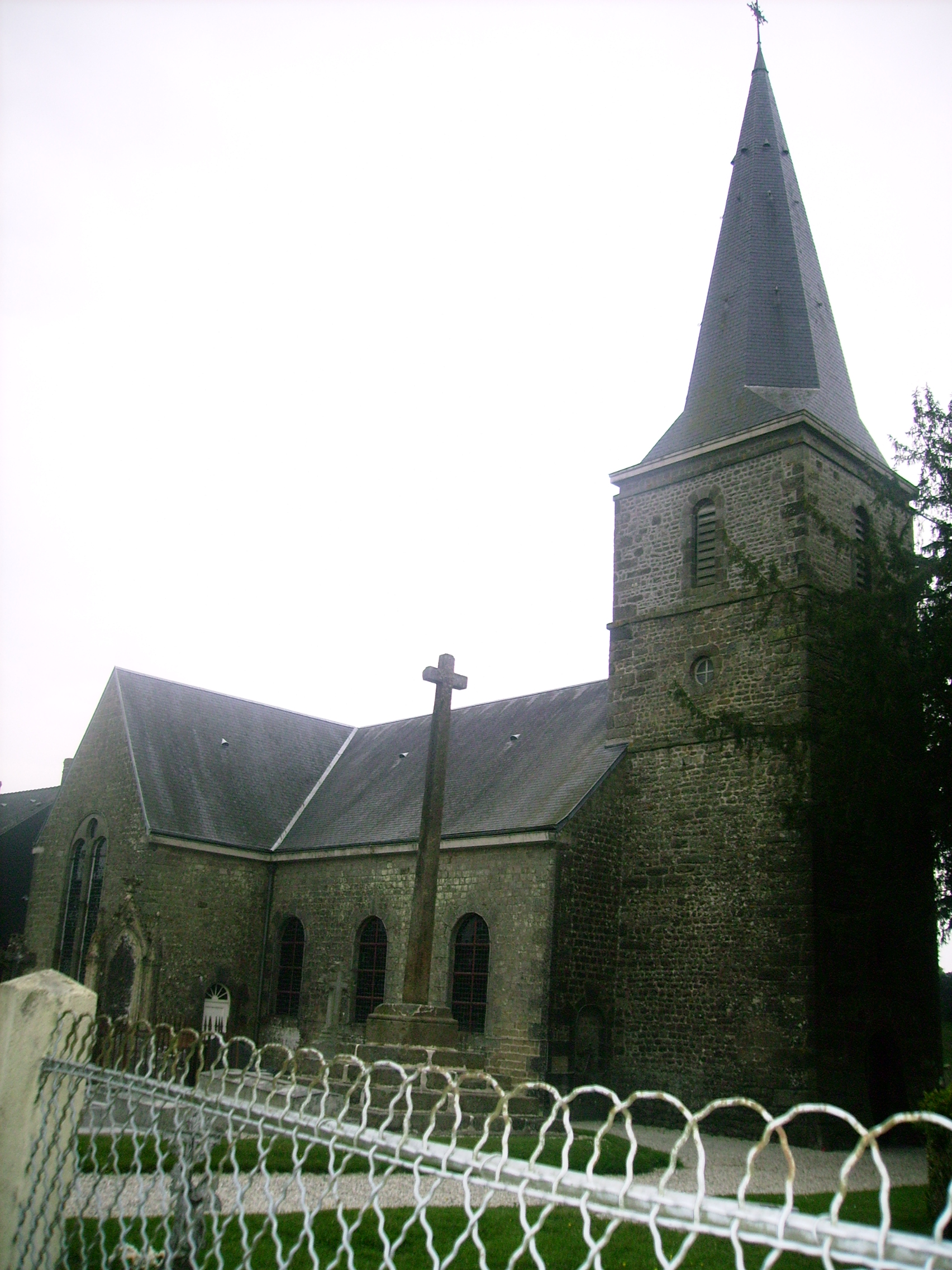 L'église de Lonlay le tesson